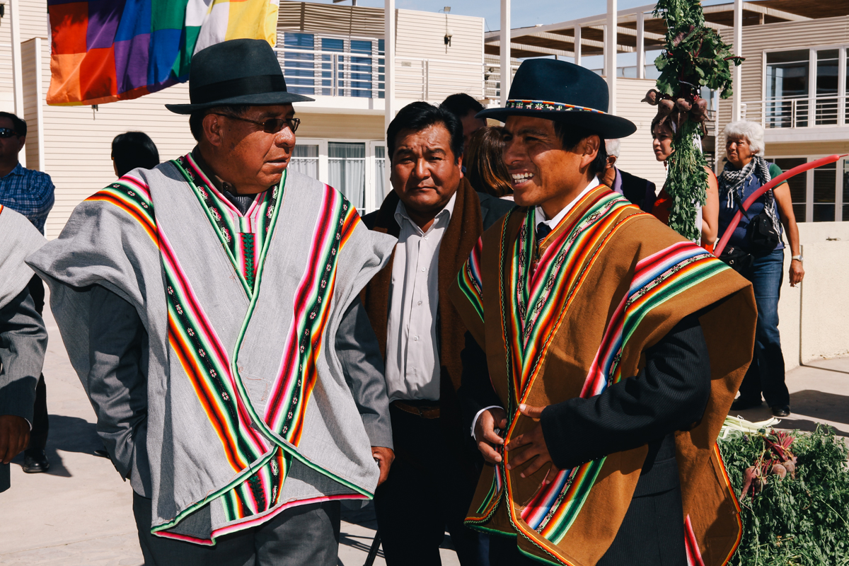 Personas de la comunidad aimara en Pozo Almonte, Chile.